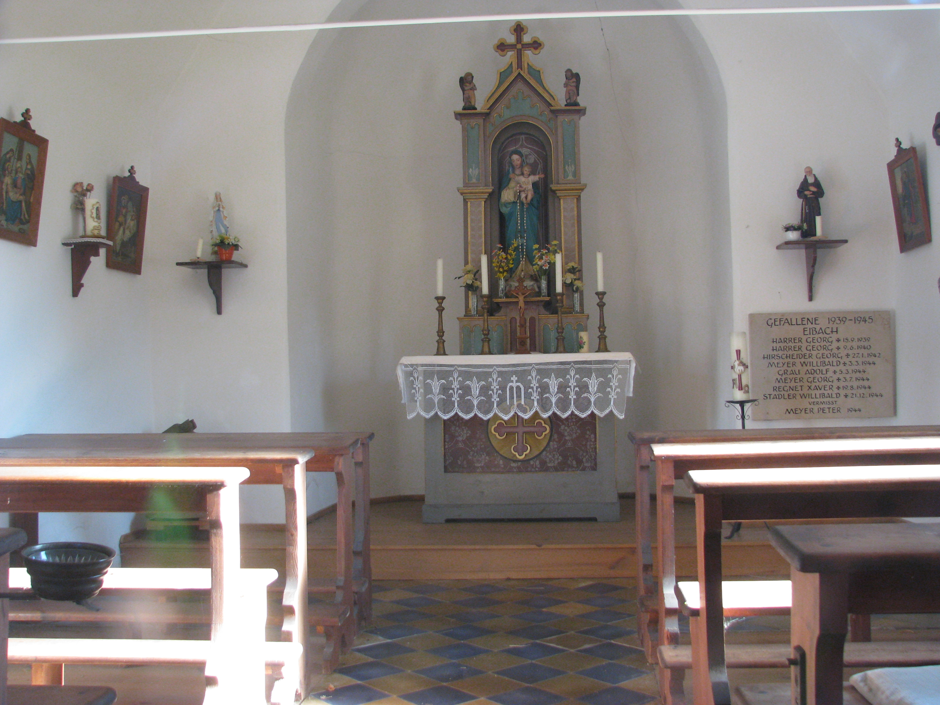 Eibach, Ortsteil von Hilpoltstein im mittelfränkischen Landkreis Roth, Katholische Ortskapelle